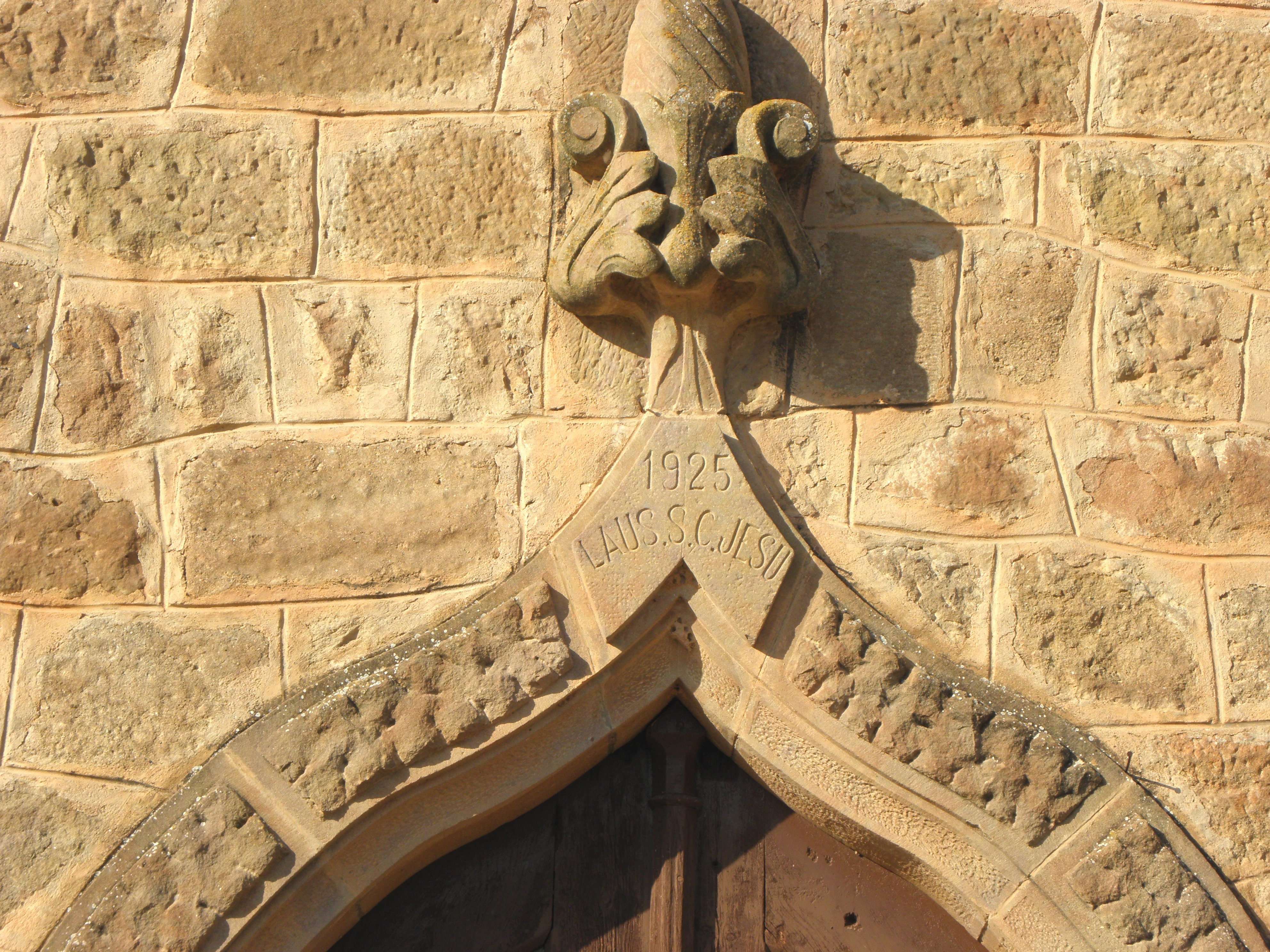 Detall de la portalda de la nova església parroquial de Sallent, municipi de Pinell de Solsonès.